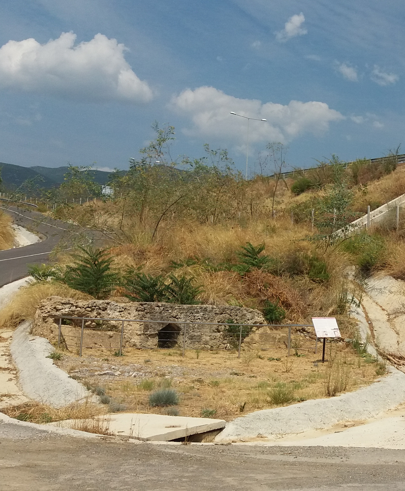 Κάστρο Καλαμάτας«Κάστρο Καλαμάτας»